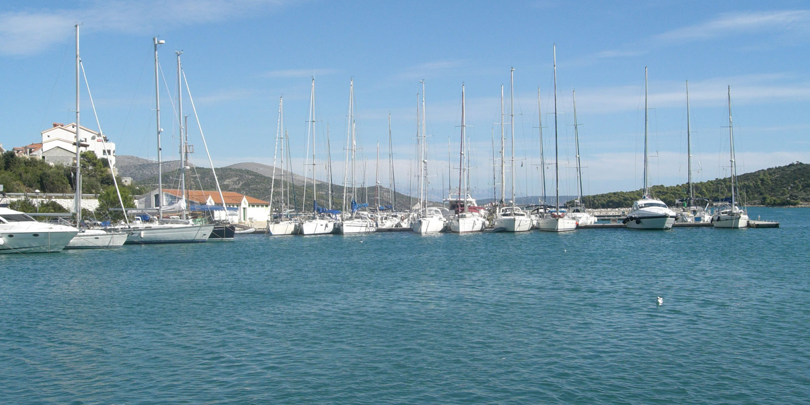 Marina, Hrvatska